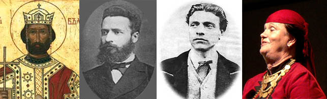 Famous Bulgarians - Boris I of Bulgaria, Vasil Levski, Hristo Botev, Valya Balkanska